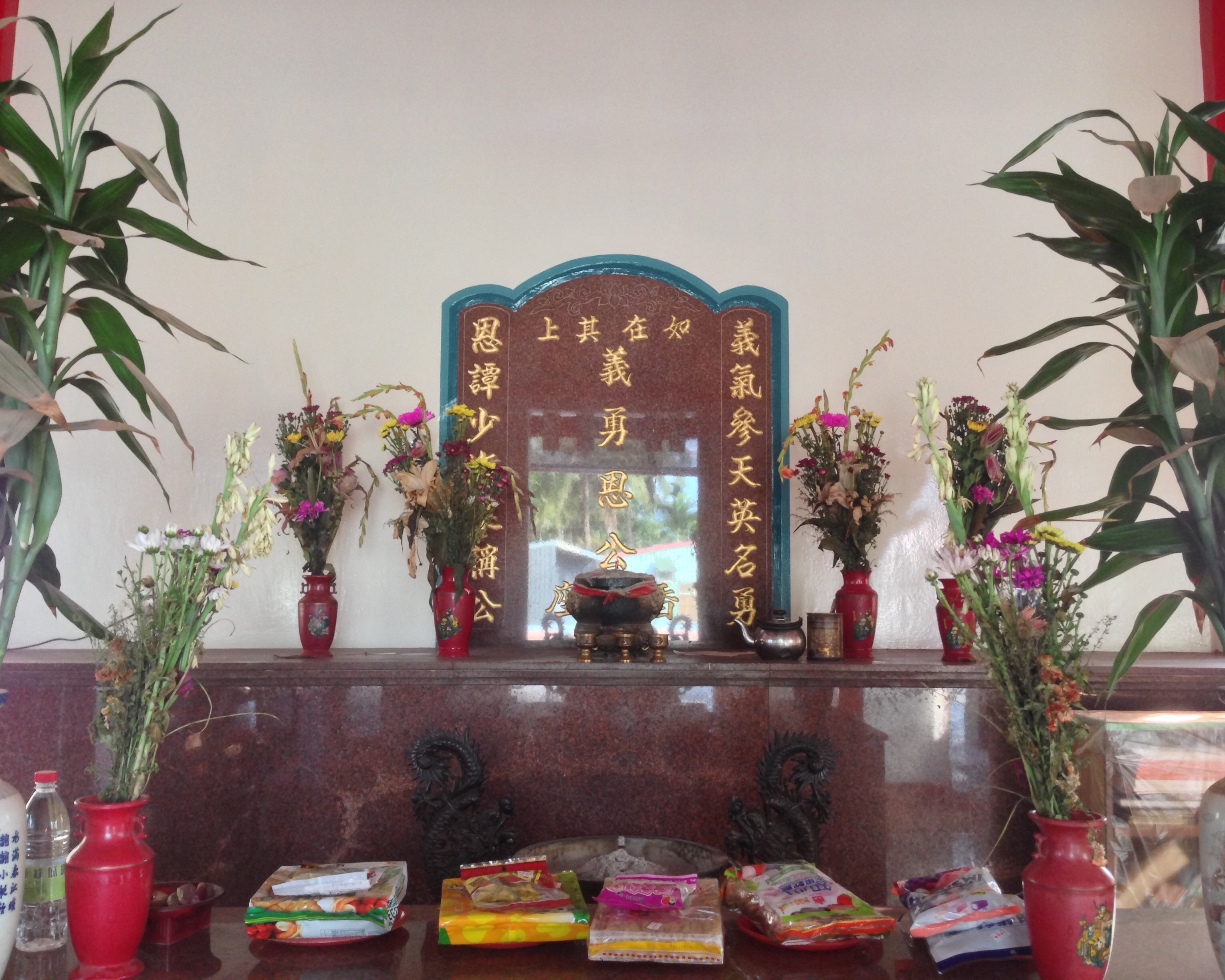 中文（台灣）: 番仔寮義勇恩公廟牌位